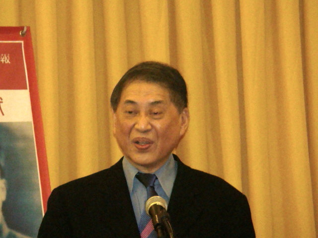 Pai Hsien-yung 白先勇